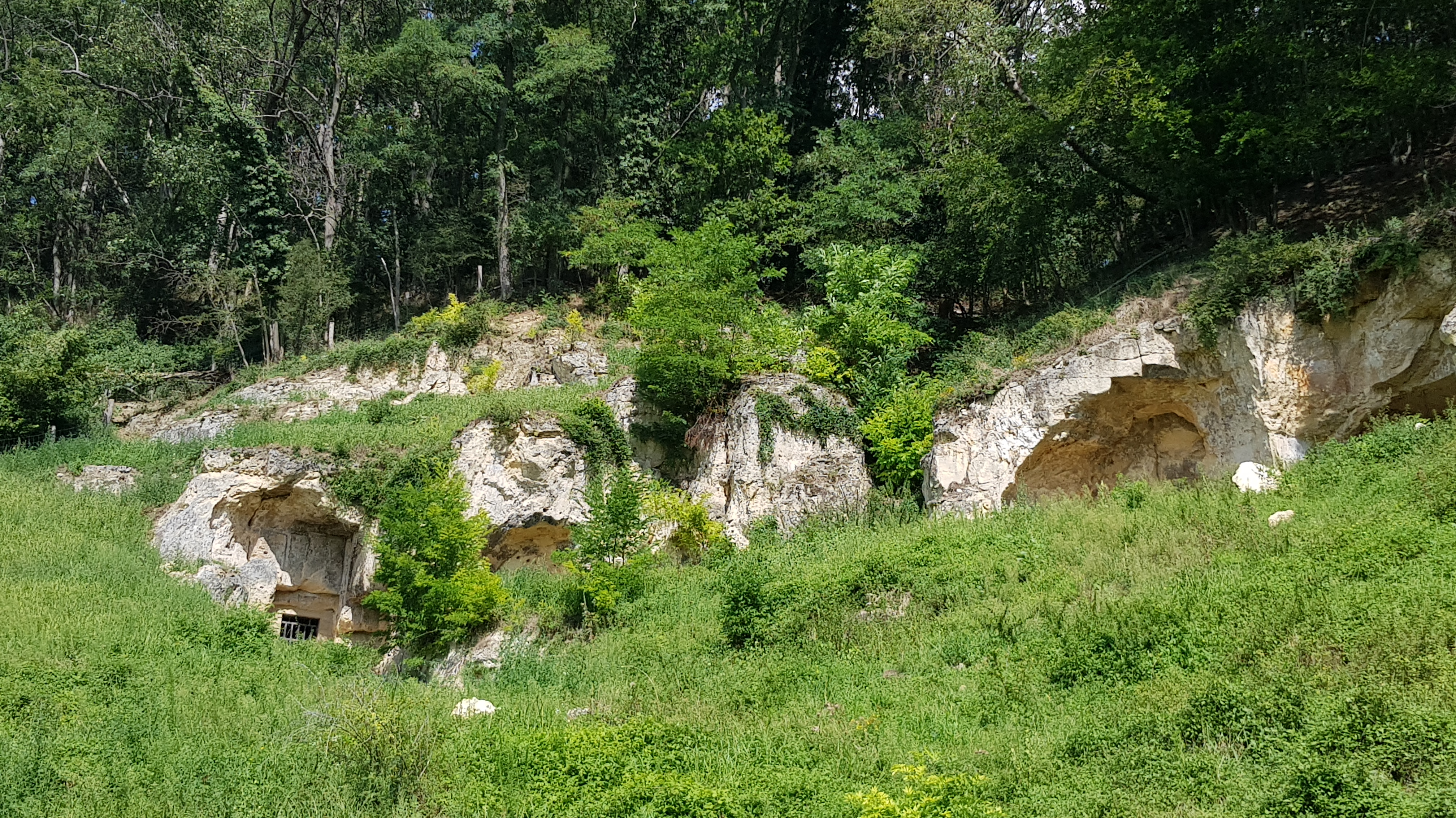 Mettenberggroeve I + II, Bemelen, Nederland